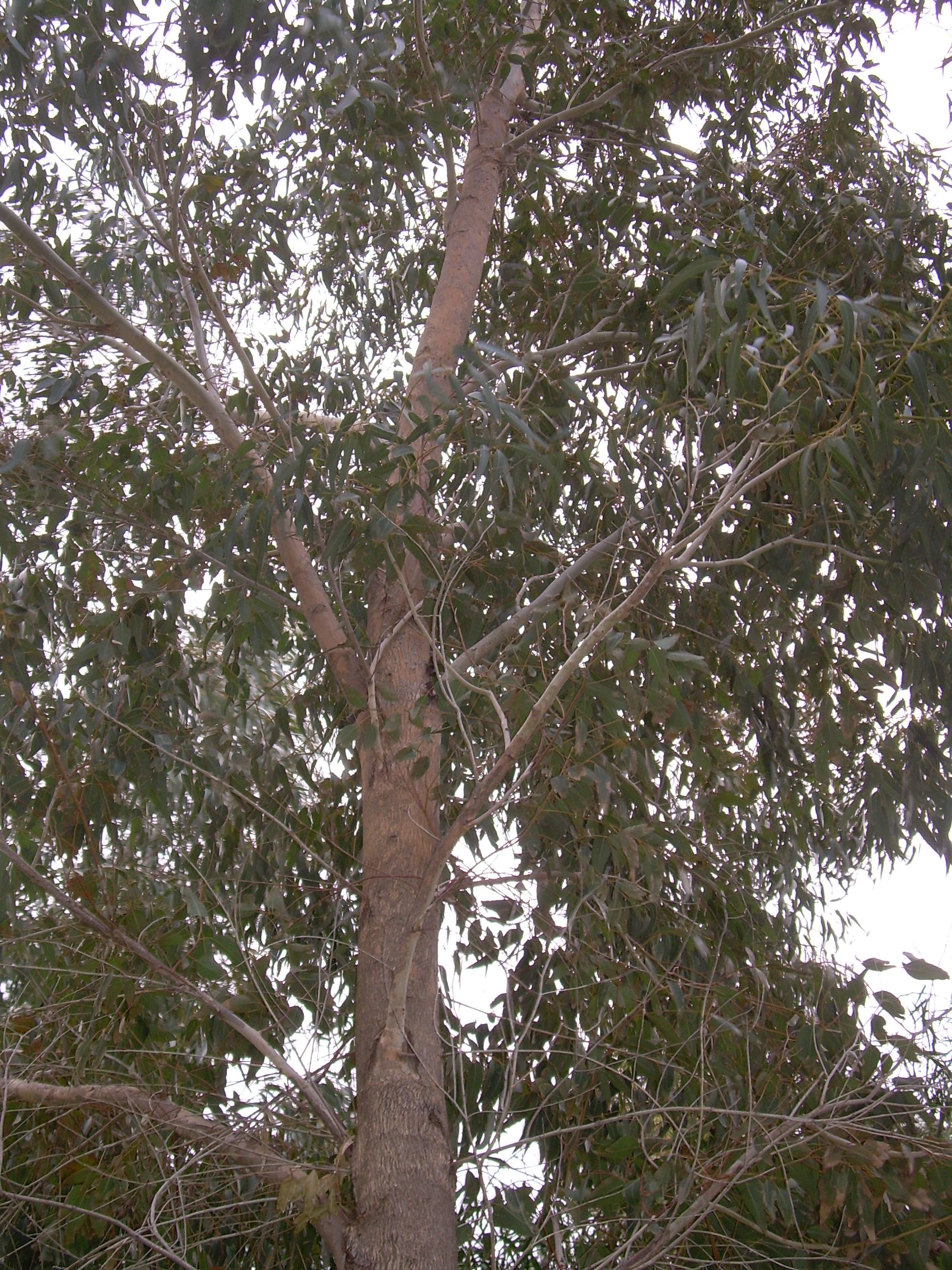 Albero di Eucalyptus botryoides